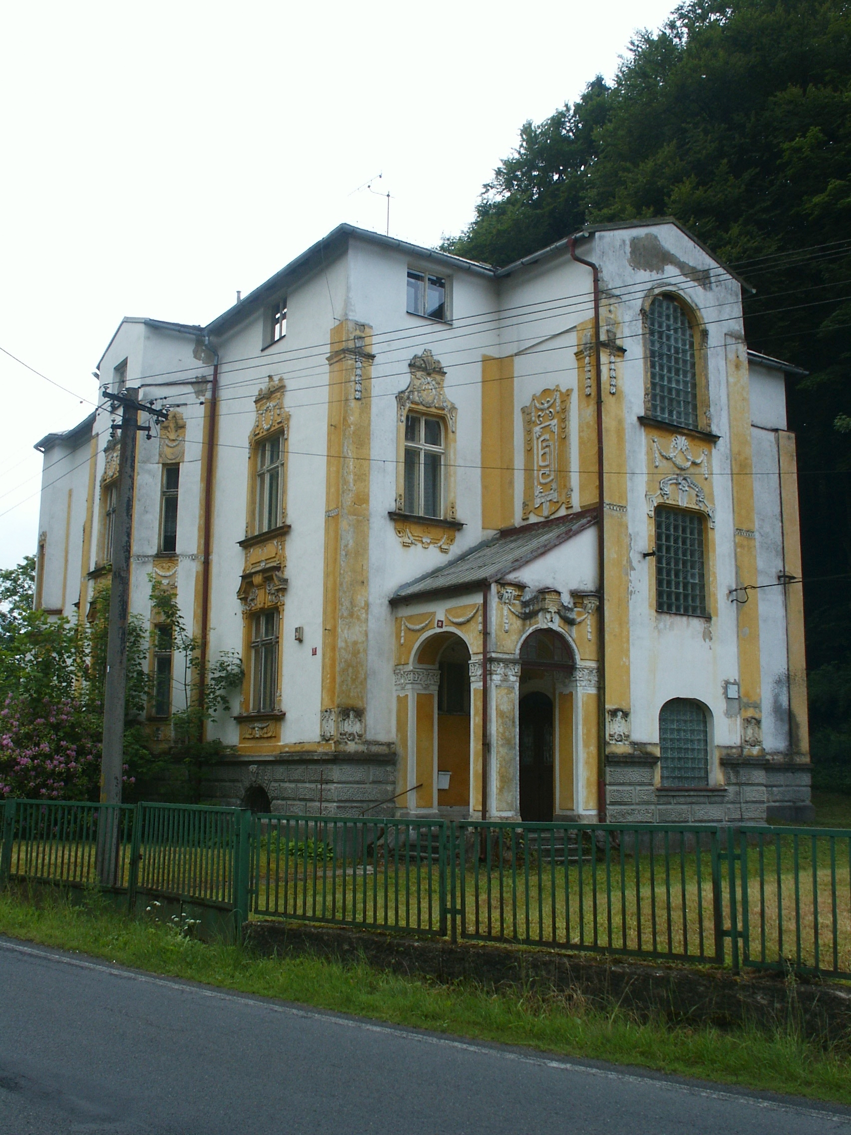 Krásný Buk - Jägerova vila (č.p. 30)